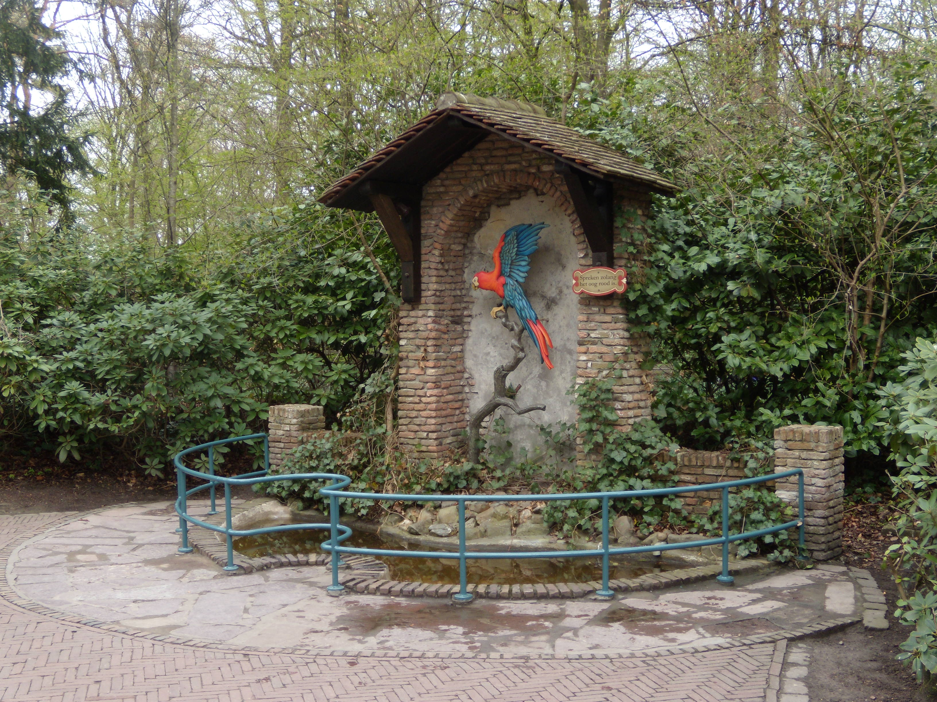 Représentation du conte De Sprekende Papegaai (Le perroquet parlant) dans le Bois des contes à Efteling.